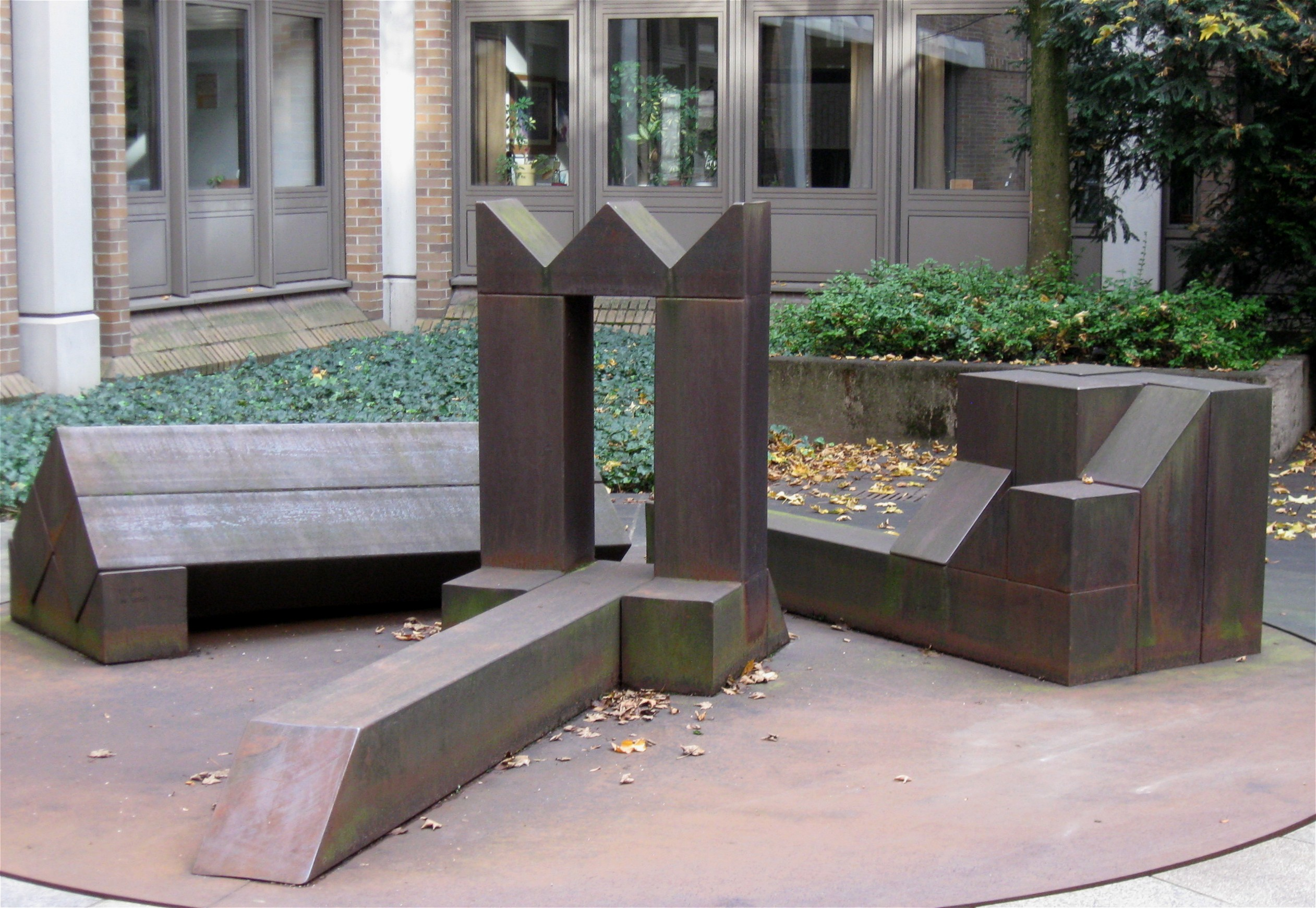 Georg Seibert: , 1985/8, dreiteilige Stahlplastik, Bundesanstalt für Arbeit, Kapuzinerstraße, München